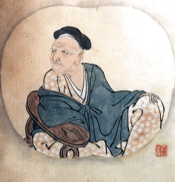 小堀遠州 / Kobori Ensyū